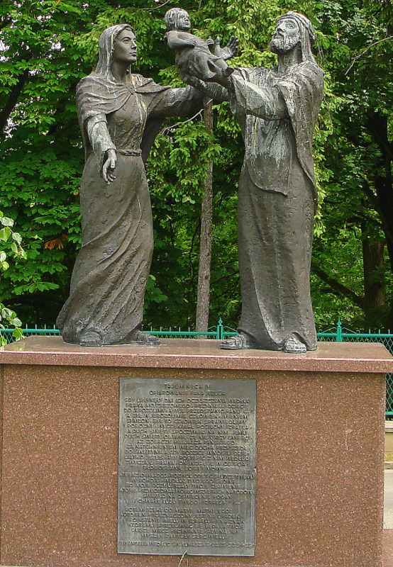 Częstochowa, zespół klasztorny paulinów na Jasnej Górze